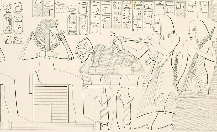 Pantherfellträger in Grabdarstellung des Ramses IV.